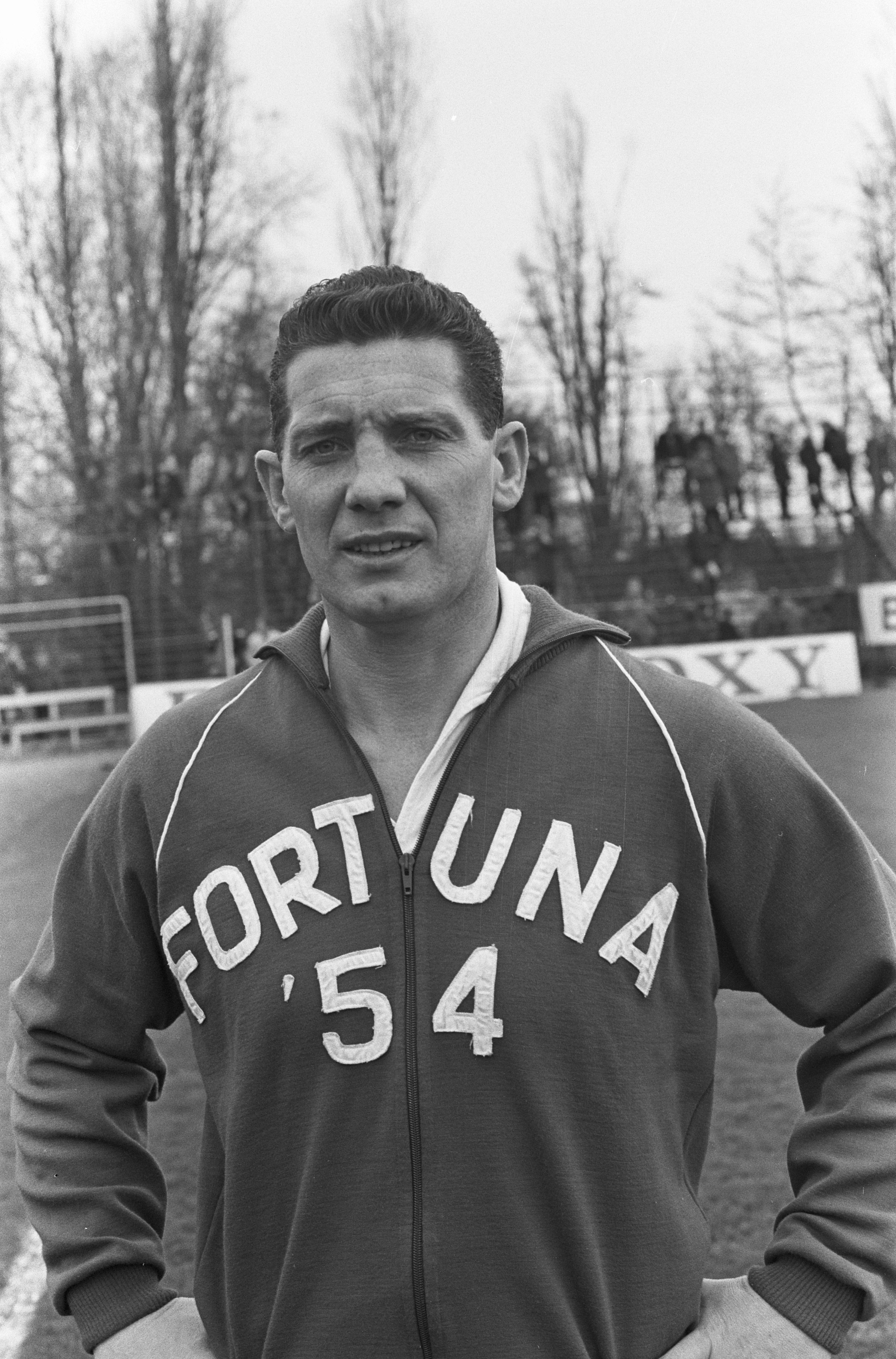 Collectie / Archief : Fotocollectie Anefo Reportage / Serie : [ onbekend ] Beschrijving : Elinkwijk tegen Fortuna 54 , Cor van der Hart (Fortuna (kop) Datum : 10 april 1966 Trefwoorden : spelers, sport, voetbal Persoonsnaam : Fortuna Fotograaf : Kroon, Ron / Anefo Auteursrechthebbende : Nationaal Archief Materiaalsoort : Negatief (zwart/wit) Nummer archiefinventaris : bekijk toegang 2.24.01.05 Bestanddeelnummer : 919-0137